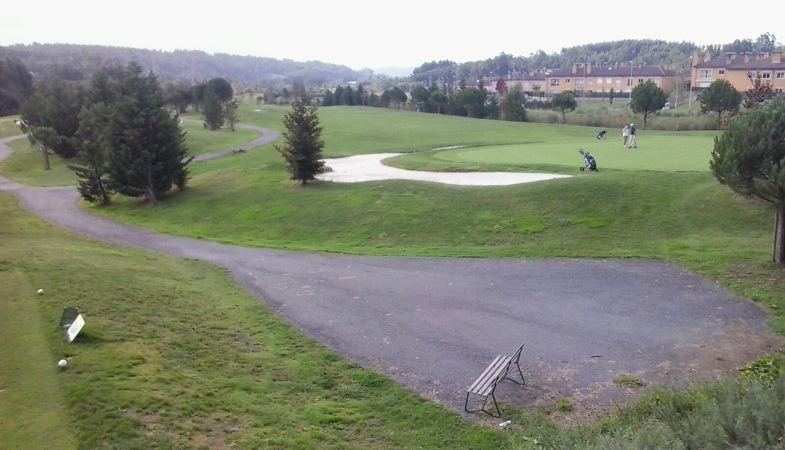 Vista do campo de golf de Miño, A Coruña Galiza Spain